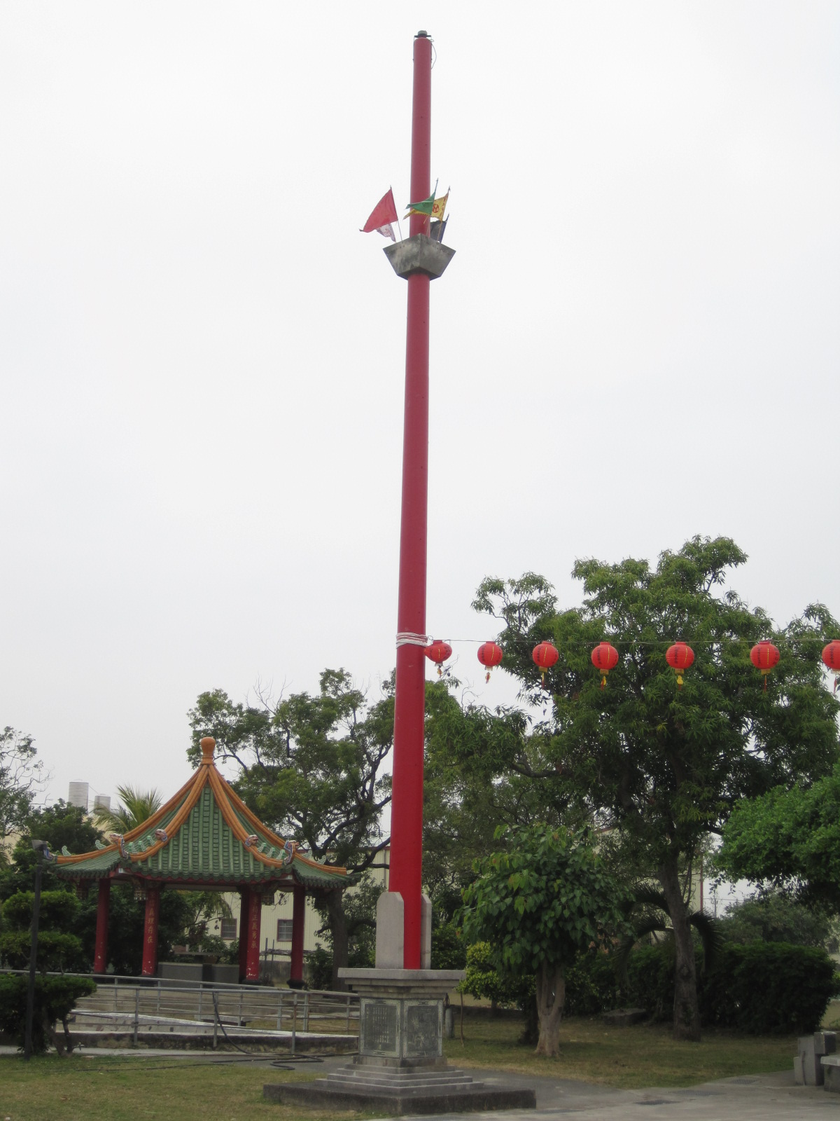 新化保生大帝宮旗桿